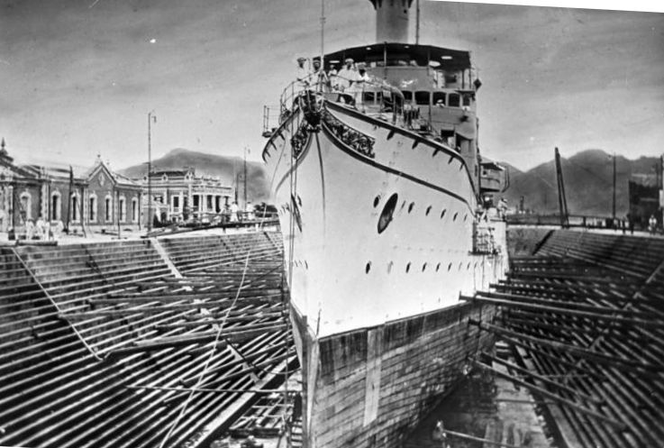 Stettin, "SMS Hansa II" im Dock Stettin.- Großer geschützter Kreuzer "S.M.S. Hansa II" der Hertha-Klasse im Dock der Vulkan Werft